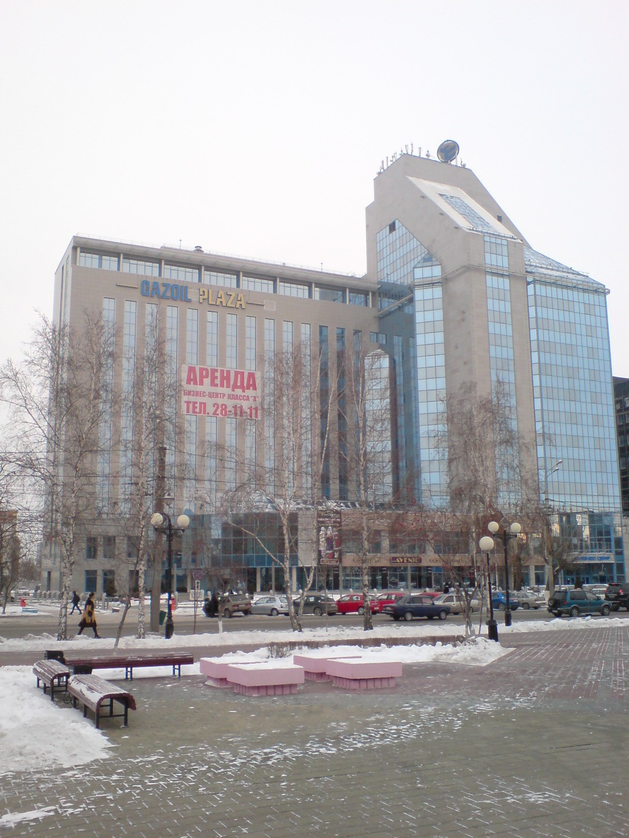 Бывшее здание «Запсибгазпрома», ныне офисный центр «Gasoil Plaza» по ул. Республики, 143а в Тюмени